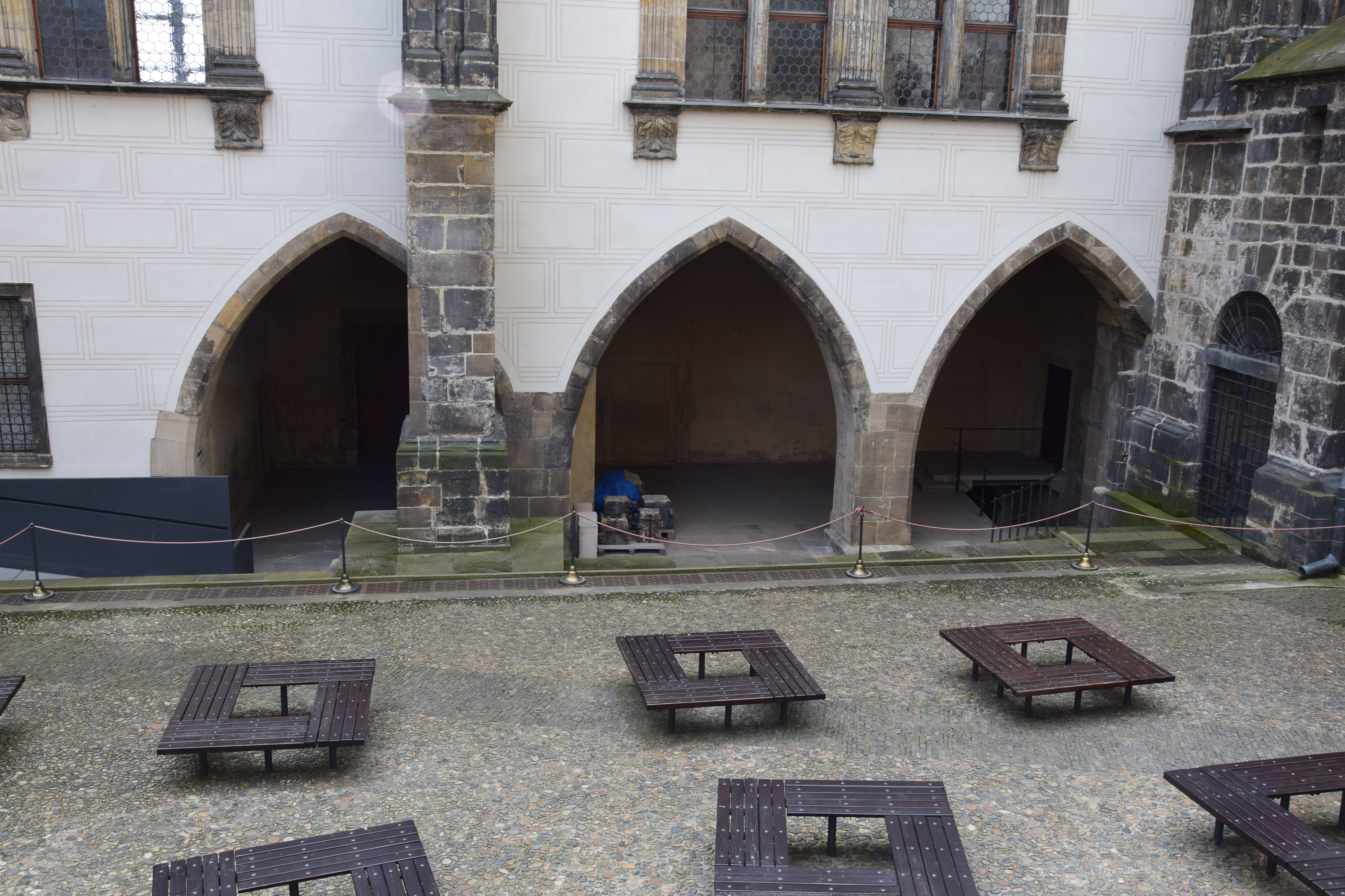 Severní dvorek